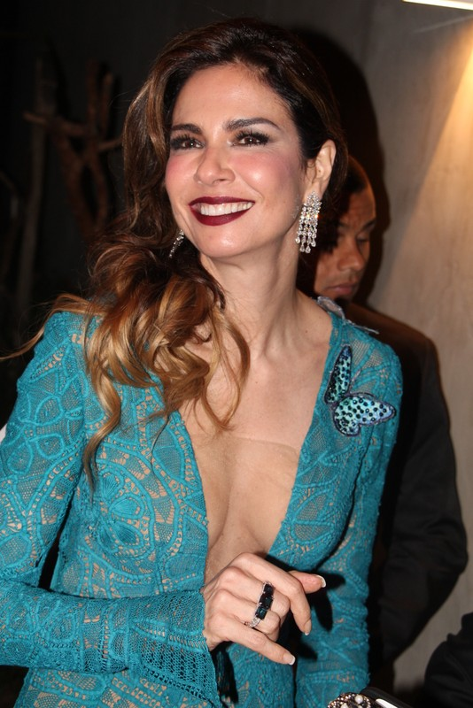 27 - Luciana Gimenez